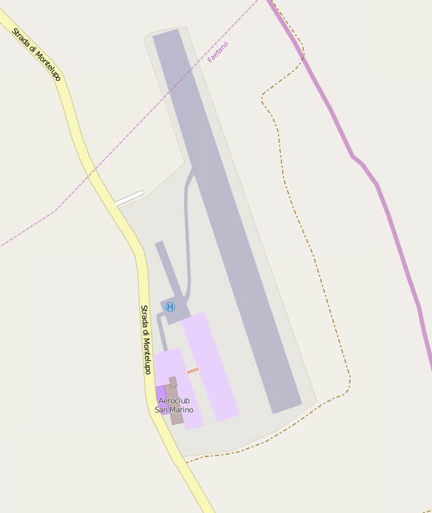 Mappa dell'Aviosuperficie di Torraccia This map may be incomplete, and may contain errors. Don't rely solely on it for navigation.